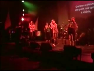 Trazendo a Arca se apresentando na Primeira Igreja Brasileira Batista de Orlando, em 2008.